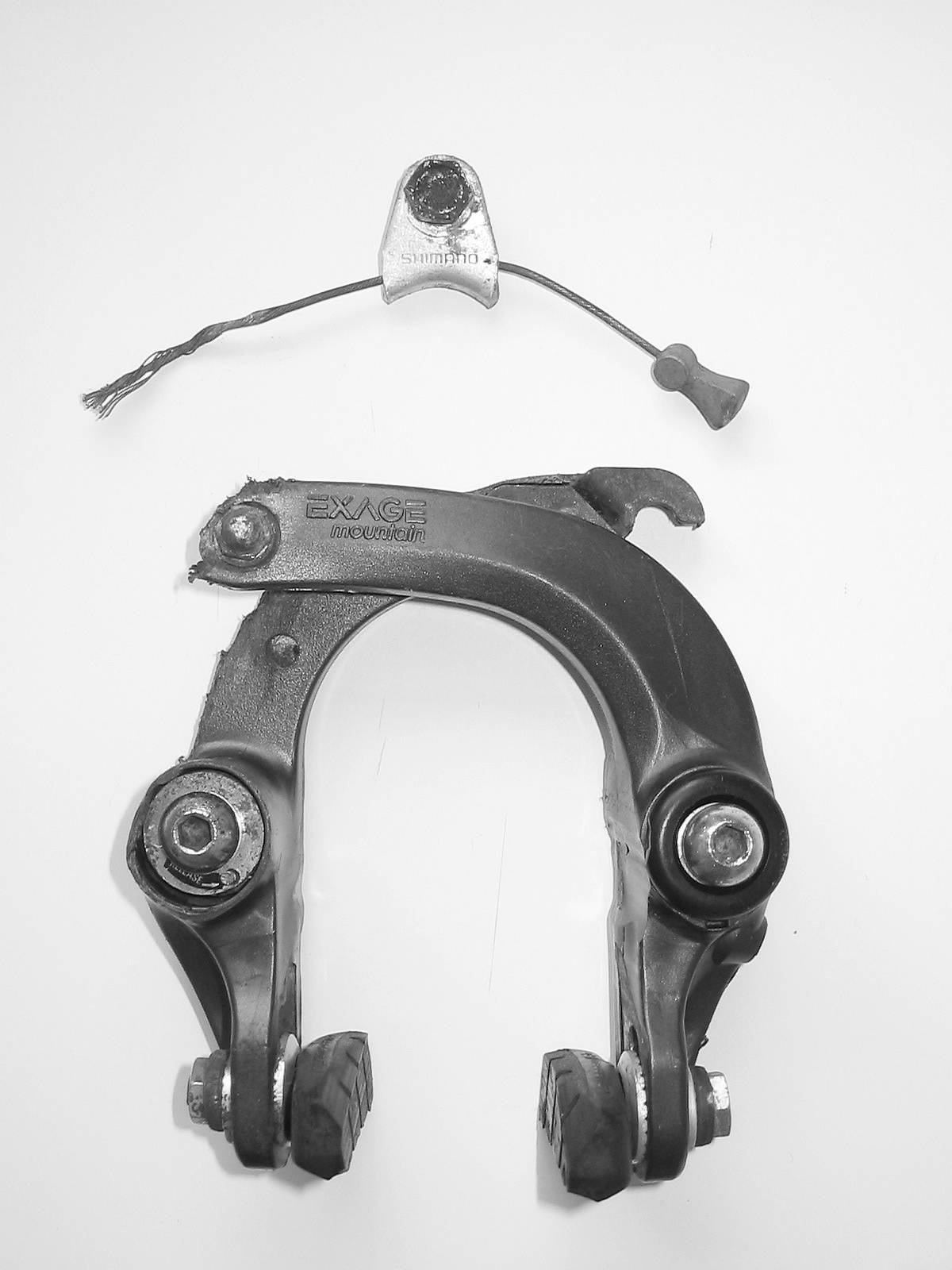 Shimano Motion U-brake